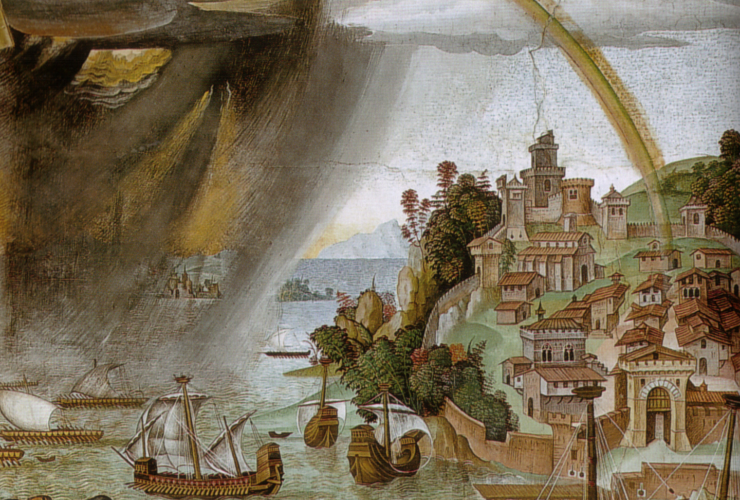 Pinturicchio, libreria piccolomini, dettaglio